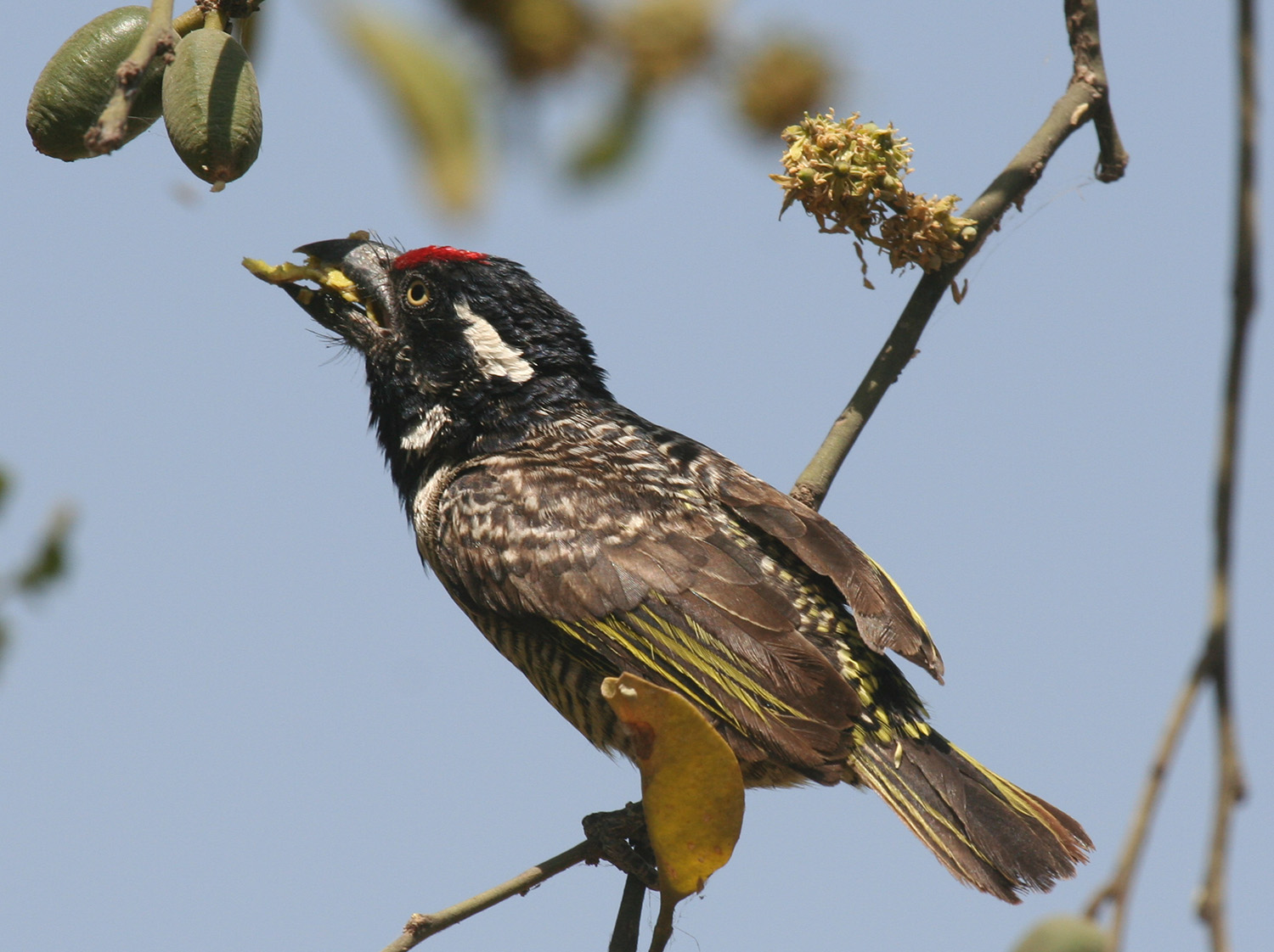 gebandeerde baardvogel